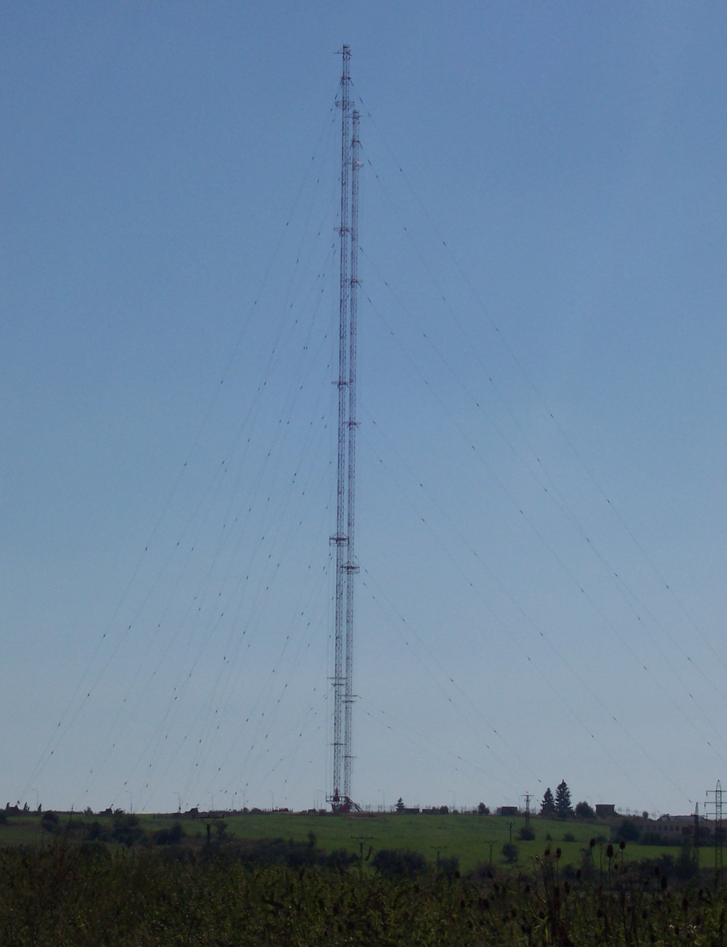 RKS Liblice 2